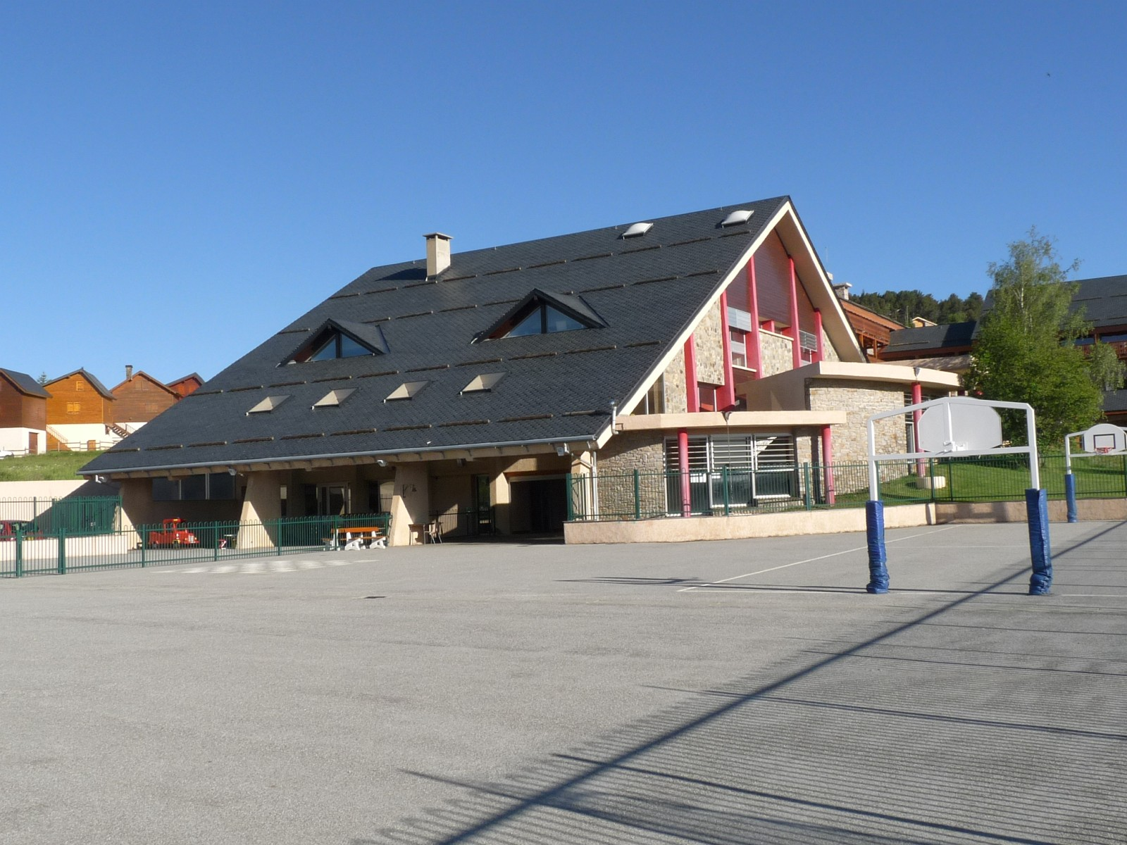 Ecole de Bolquère, P.O., France